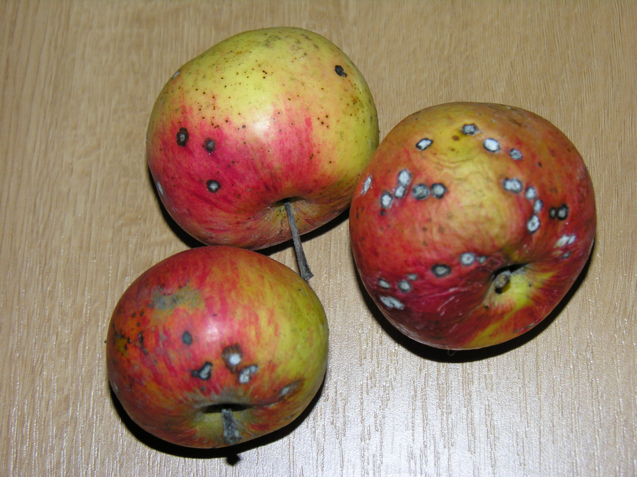 Obelinis rauplėgrybis (Ventura inaequalis) Fotografavo Algirdas 2006 m. sausio 1 d.